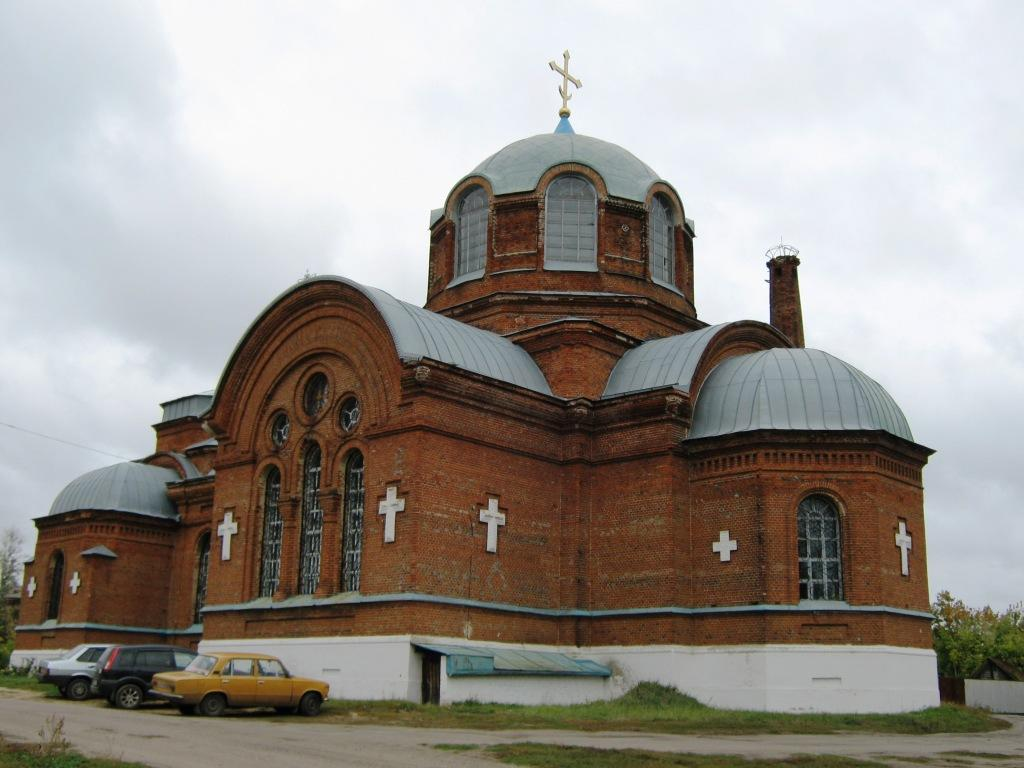 Крестовоздвиженская церковь в с. Березово